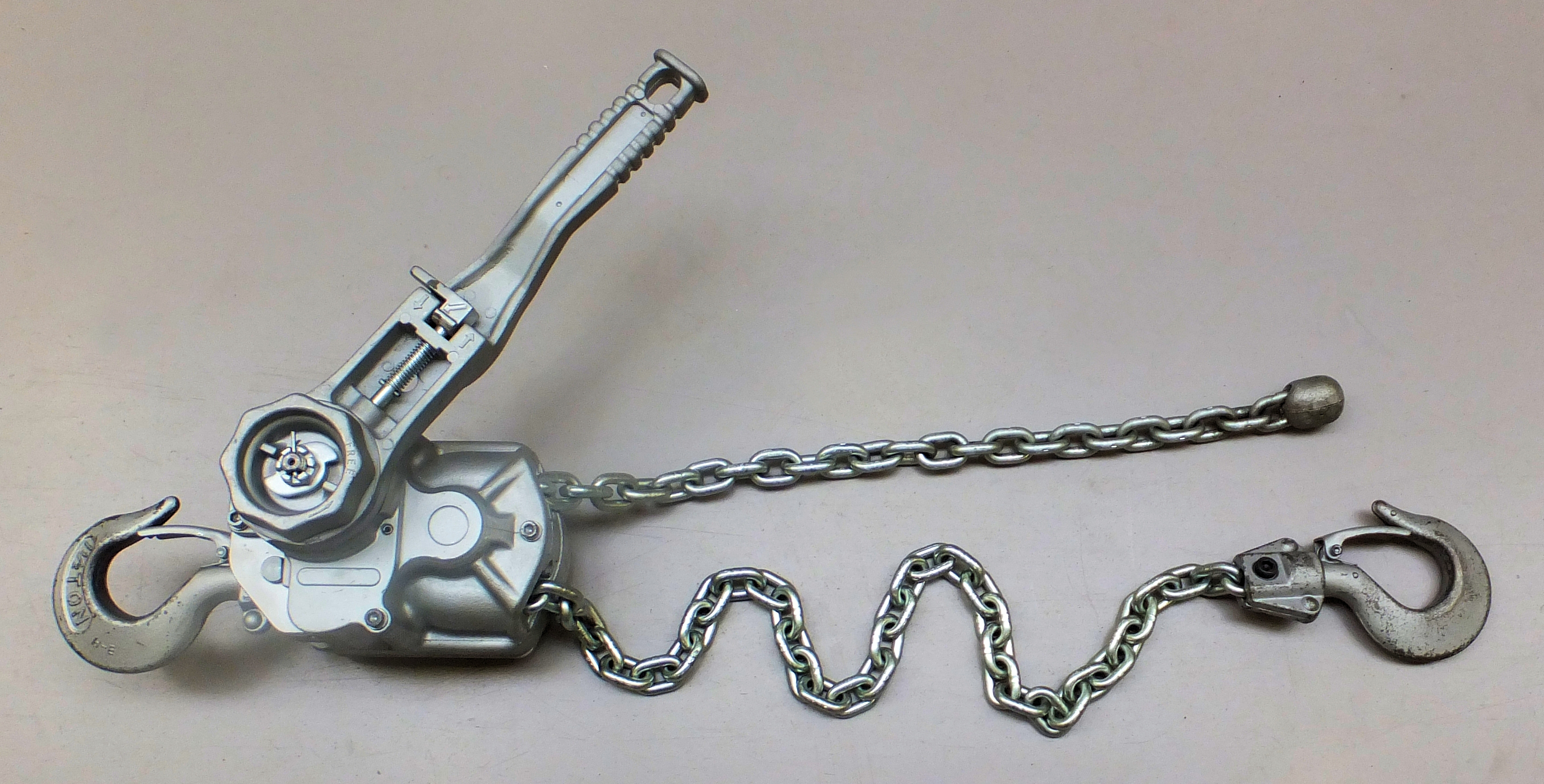 Handbetriebener Kettenzug wie er zumeist für Montage- und Demontagearbeiten eingesetzt wird